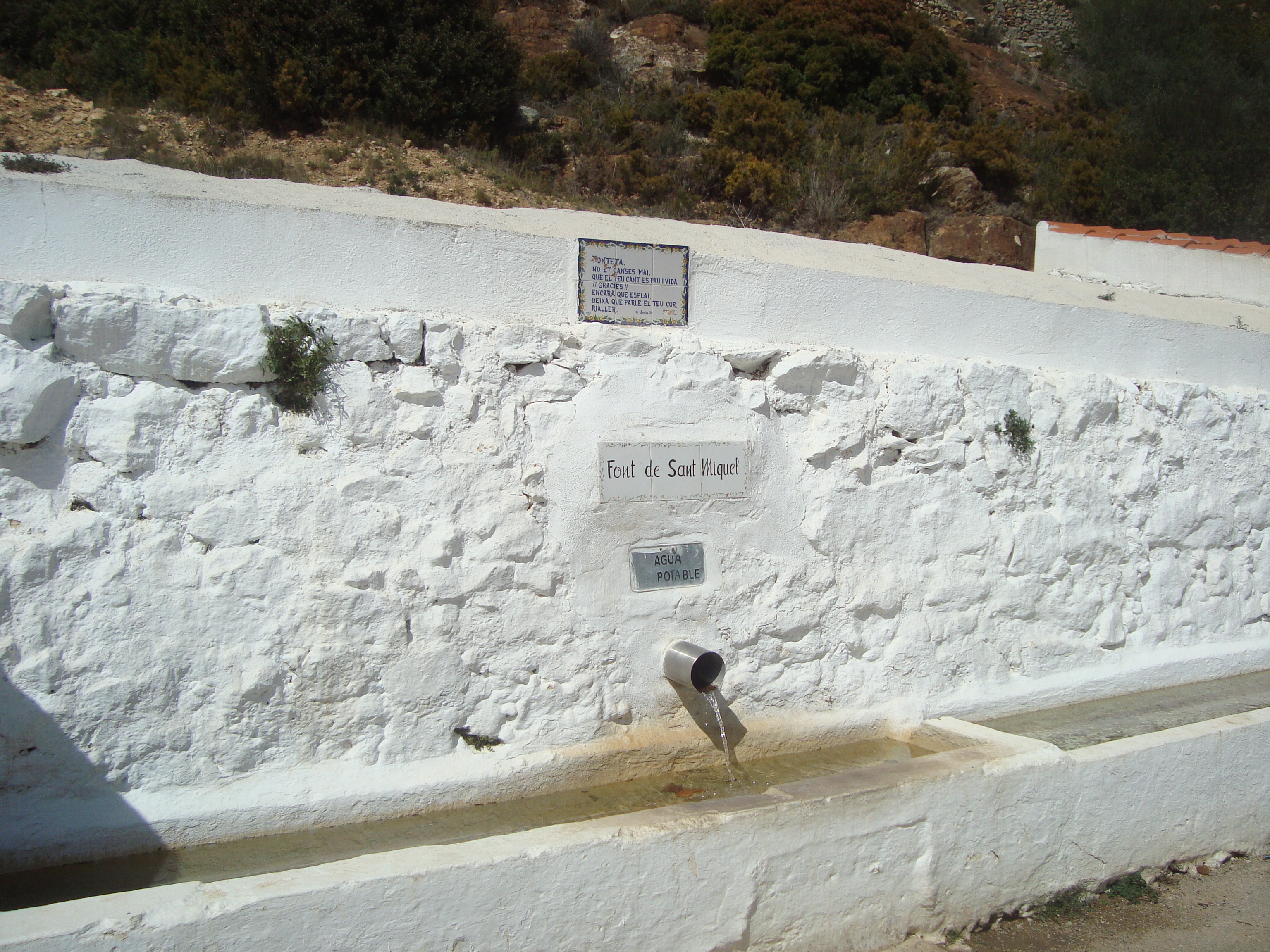 Fuente de San Miguel (La Sierra Engarceran)